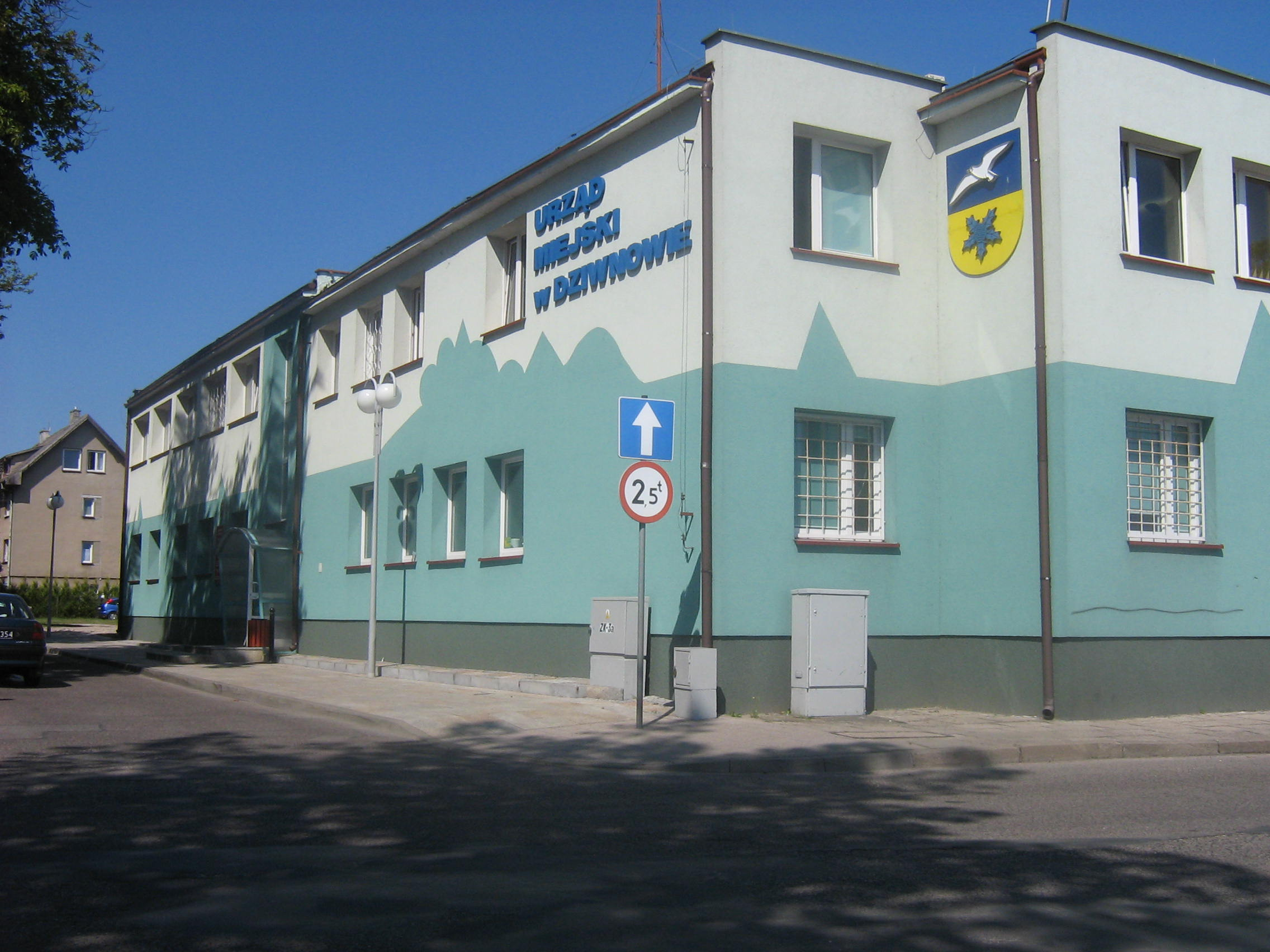 Urząd Miasta w Dziwnowie